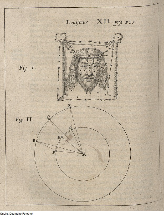 Original image description from the Deutsche Fotothek Astronomie & Himmelssphäre